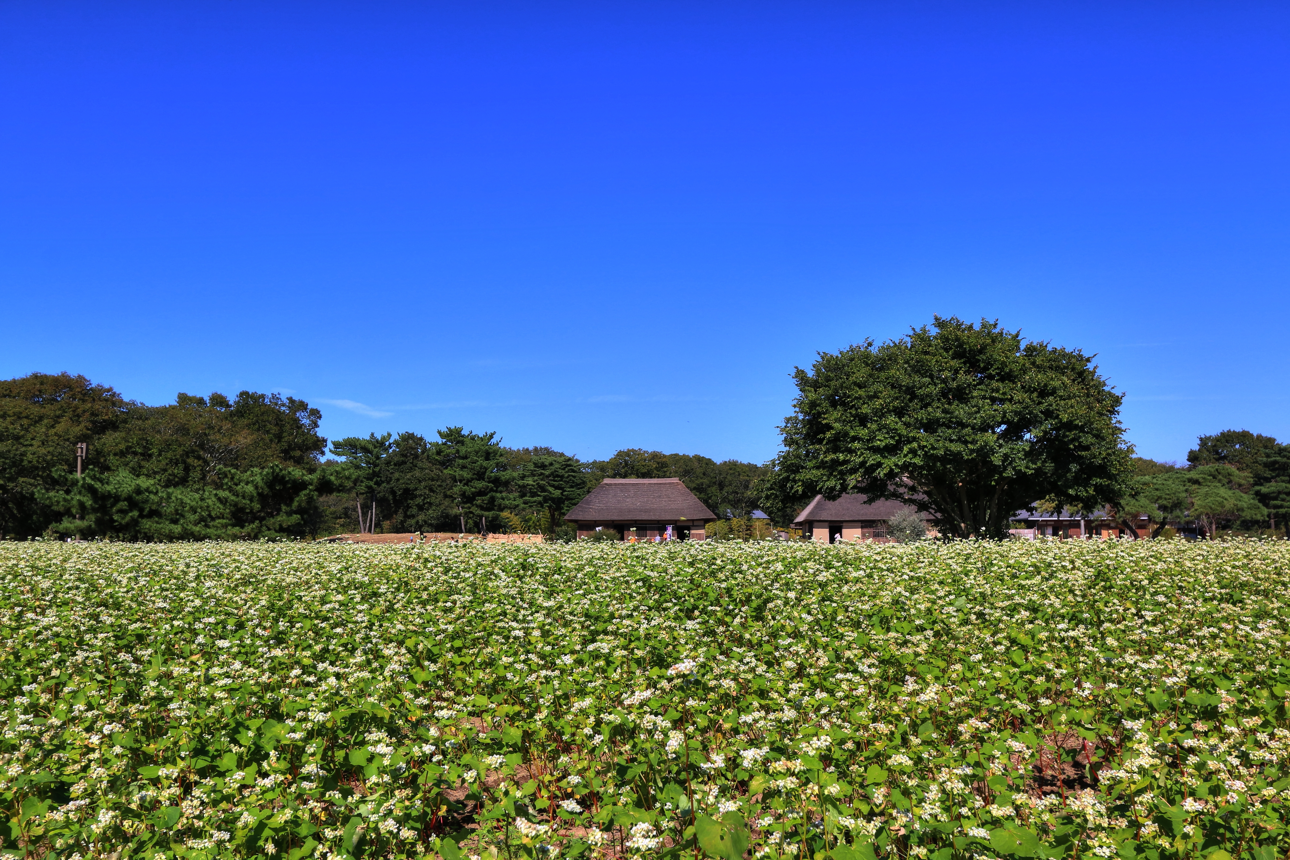 ひたち海浜公園